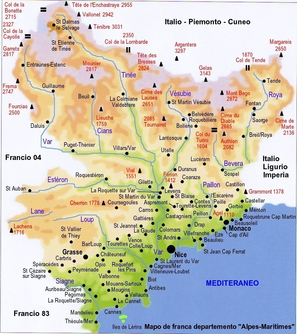 Mapo de la franca departemento de "Alpes-Maritimes" (n°06, "ĉemaraj alpoj"), kiun verkis S-ro Eric Coffinet. nigre skribitaj : landoj kaj urboj. blue skribitaj : maro kaj riveroj. ruĝe skribitaj : montaroj